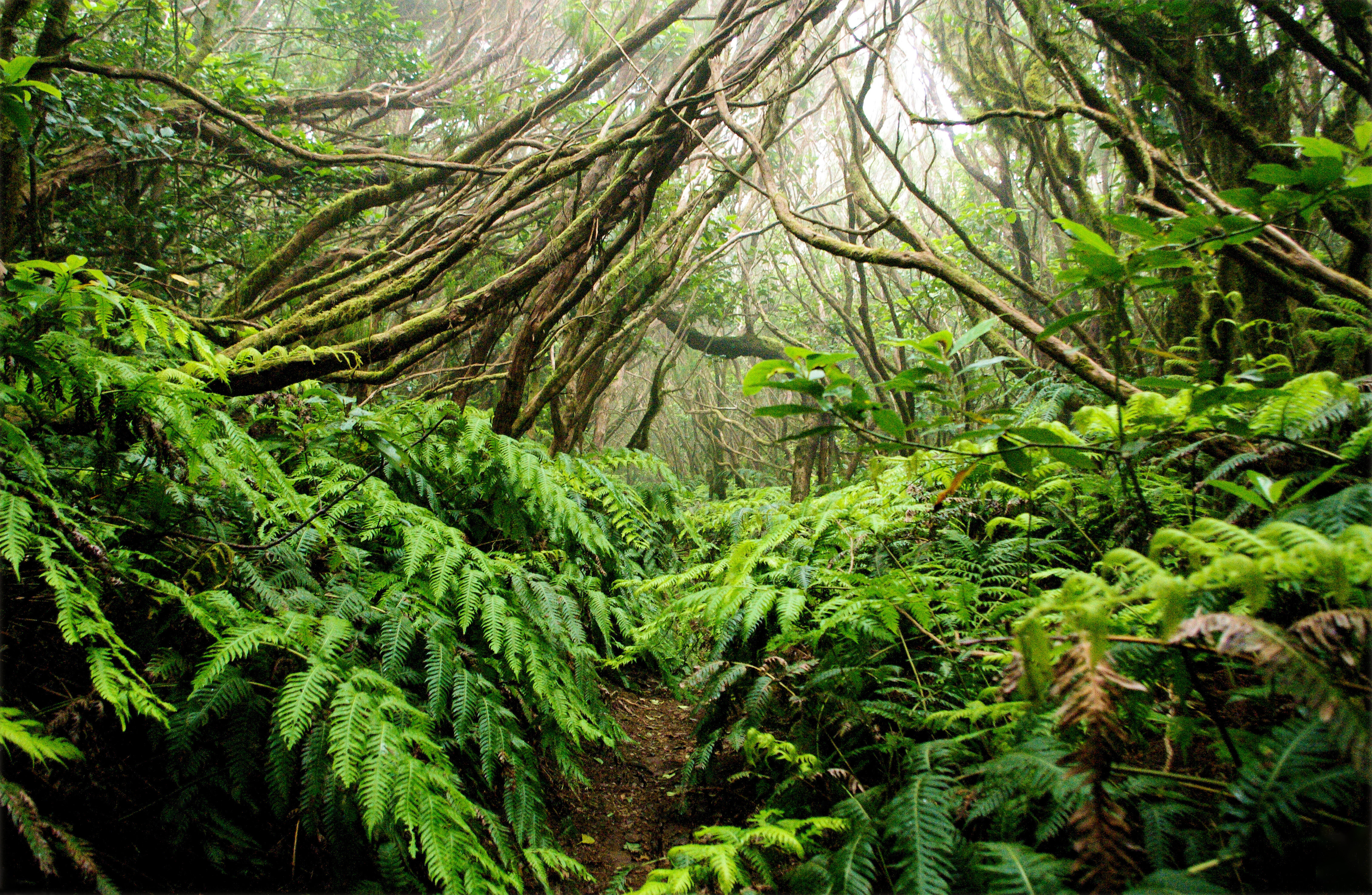 Bosque de Laurisilvas